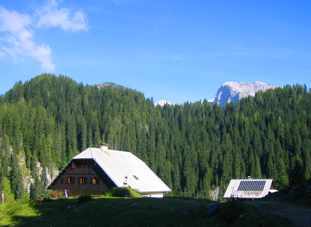 Alpine hut "Planina pri Jezeru", Above Bohinj lake, Slovenia photo:Ziga 11:50, 16 April 2007 (UTC)